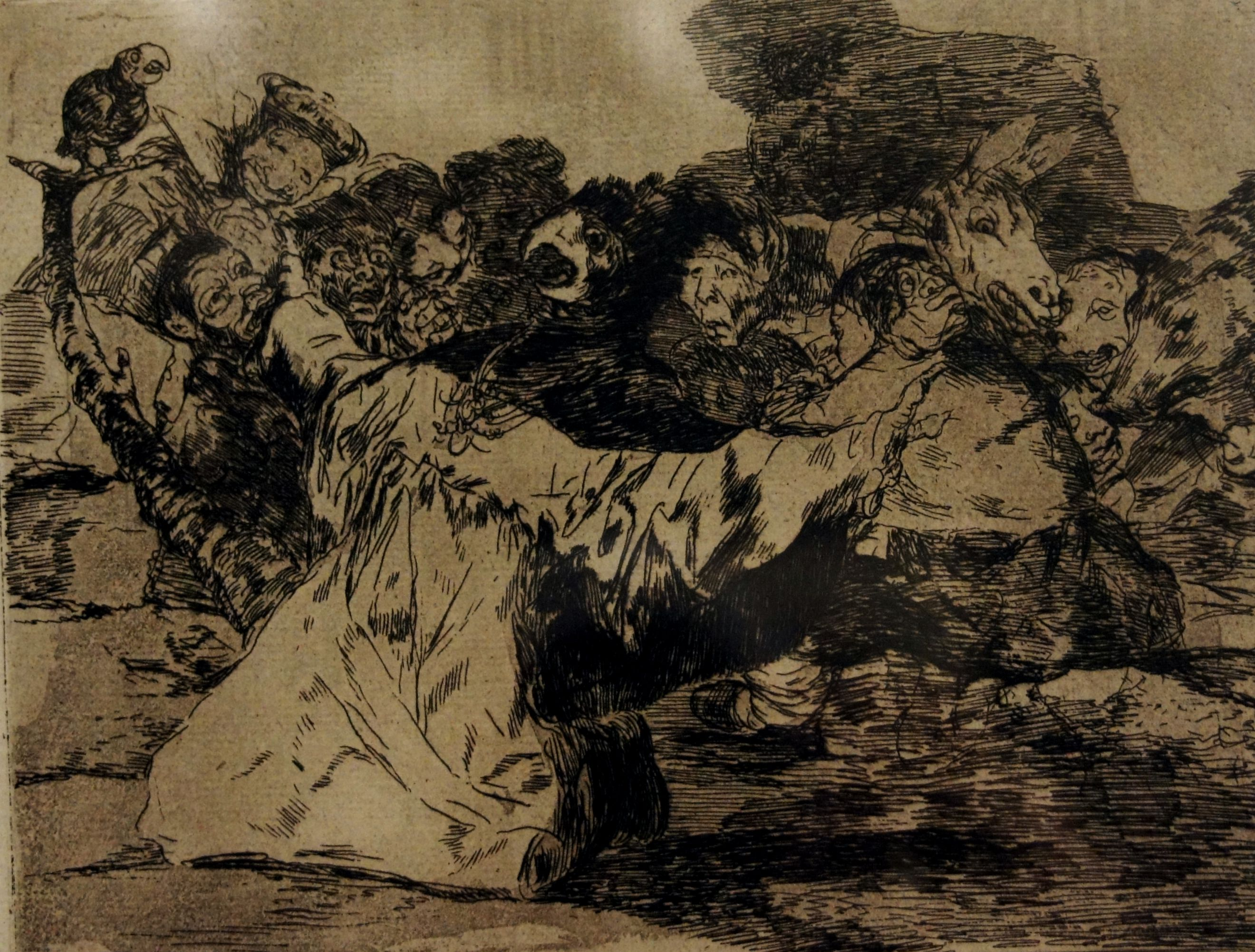 Farándula de charlatanes (75). Aguafuerte, aguada o aguatinta, punta seca y escoplo. La estampa presenta, de frente, a un personaje revestido de ropas talares, a modo de papagayo de corvo pico, bajo la capucha de plumaje, con las garras extendidas, como si pronunciase una plegaria o alocución. Su hábito de anchas mangas se recorta en blanco sobre un oscuro montón de otros personajes grotescos, entre animales y humanos. Algunos con tocados a modo de coronas, gesticulan simiescos ante un ridículo pollo de loro, junto a un racimo de facies grotescas y confusas. Hacia la derecha hay otro personaje humano, de cara pálida y manos cruzadas, ante un asno, un marrano y otras bestias. Es posible que esta farándula, de enorme potencia grotesca y un poco amenazadora, represente a los charlatanes de vario pelaje en la nueva corte de Madrid.